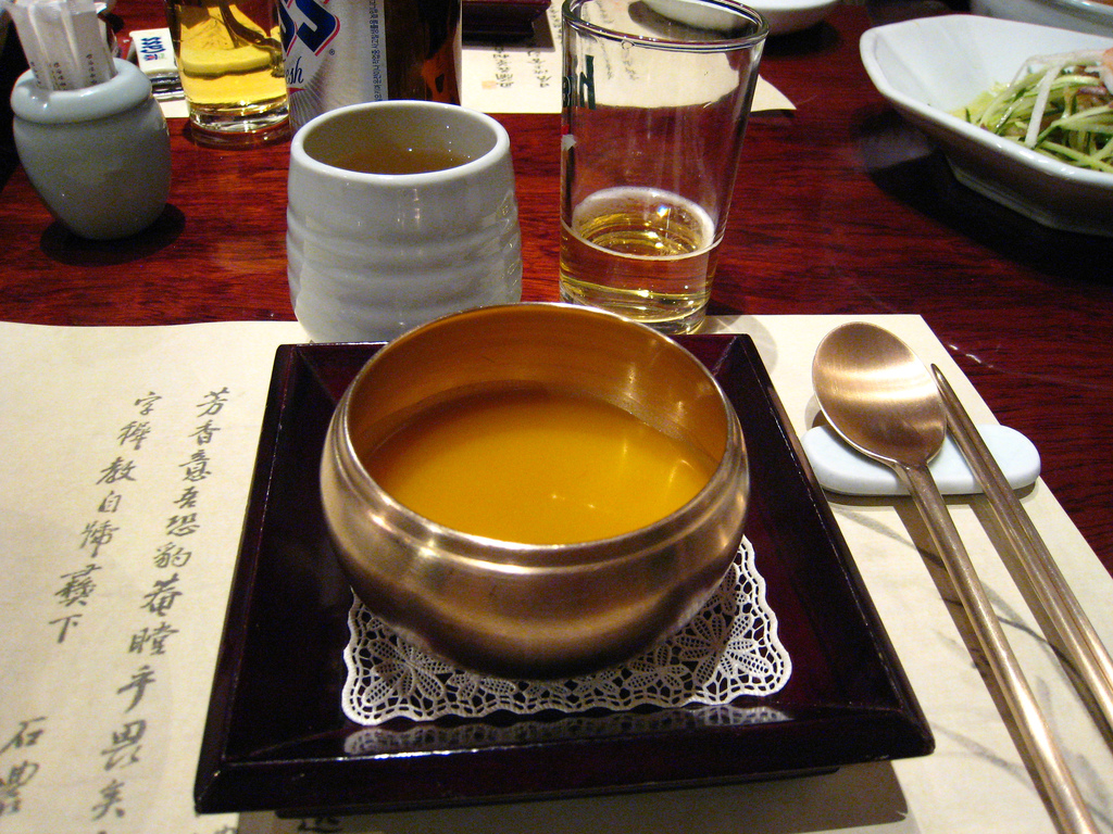 Hobakjuk, Korean pumpkin congee